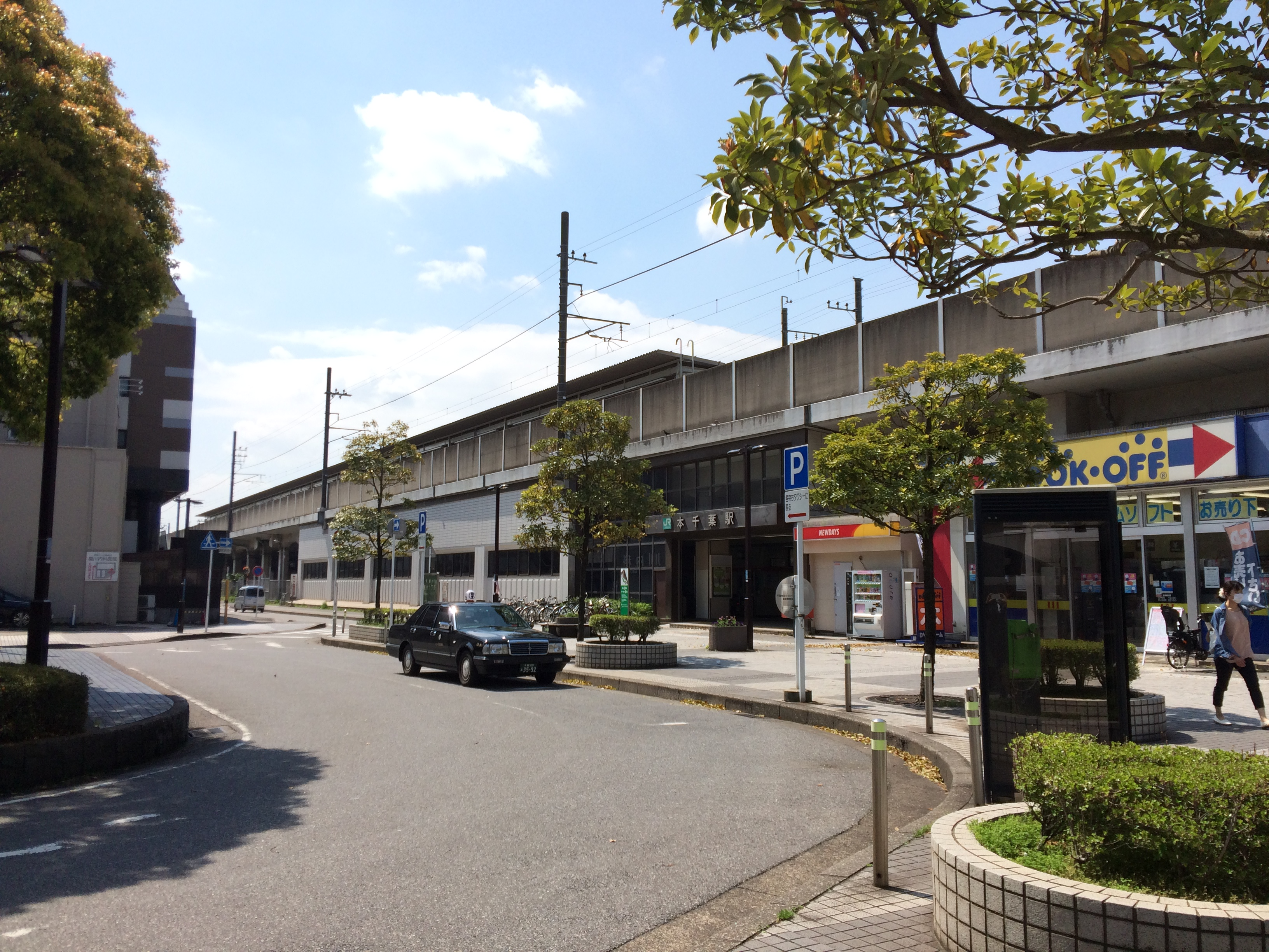 2015年4月15日に撮影した本千葉駅東口